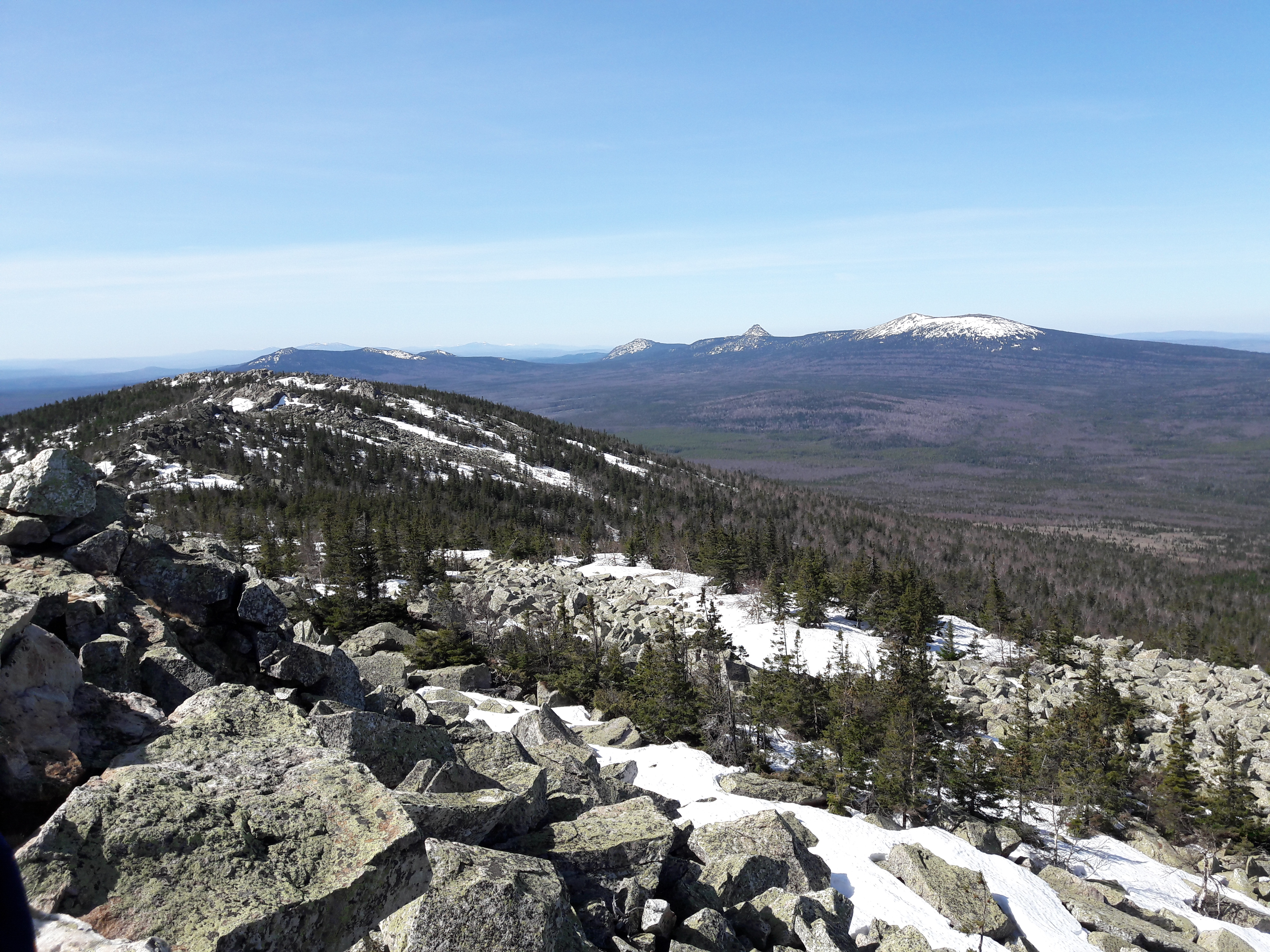 Вершина горы Ицыл: Златоуст, Челябинская область This image is related to the protected area of Russia number 7410094